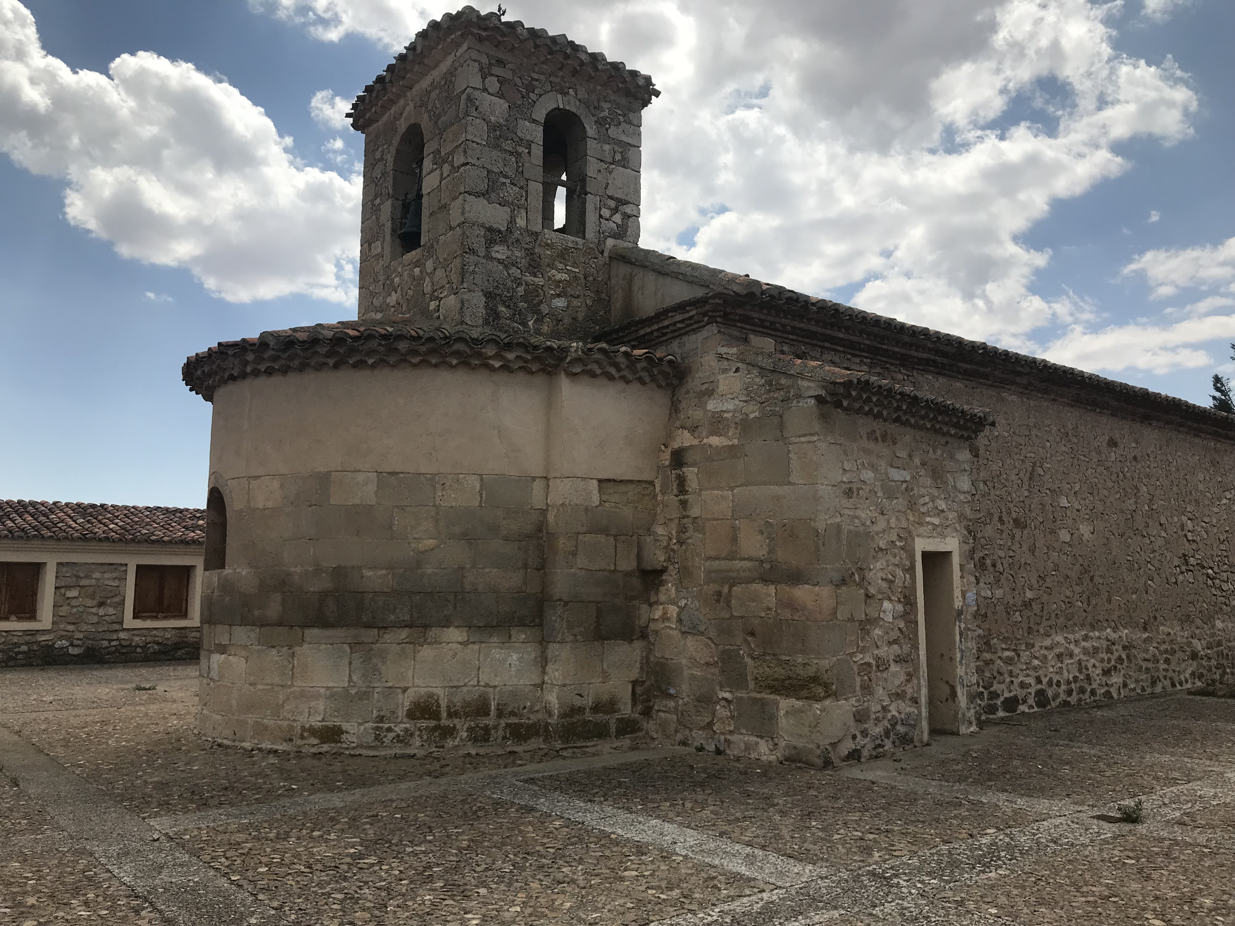 r